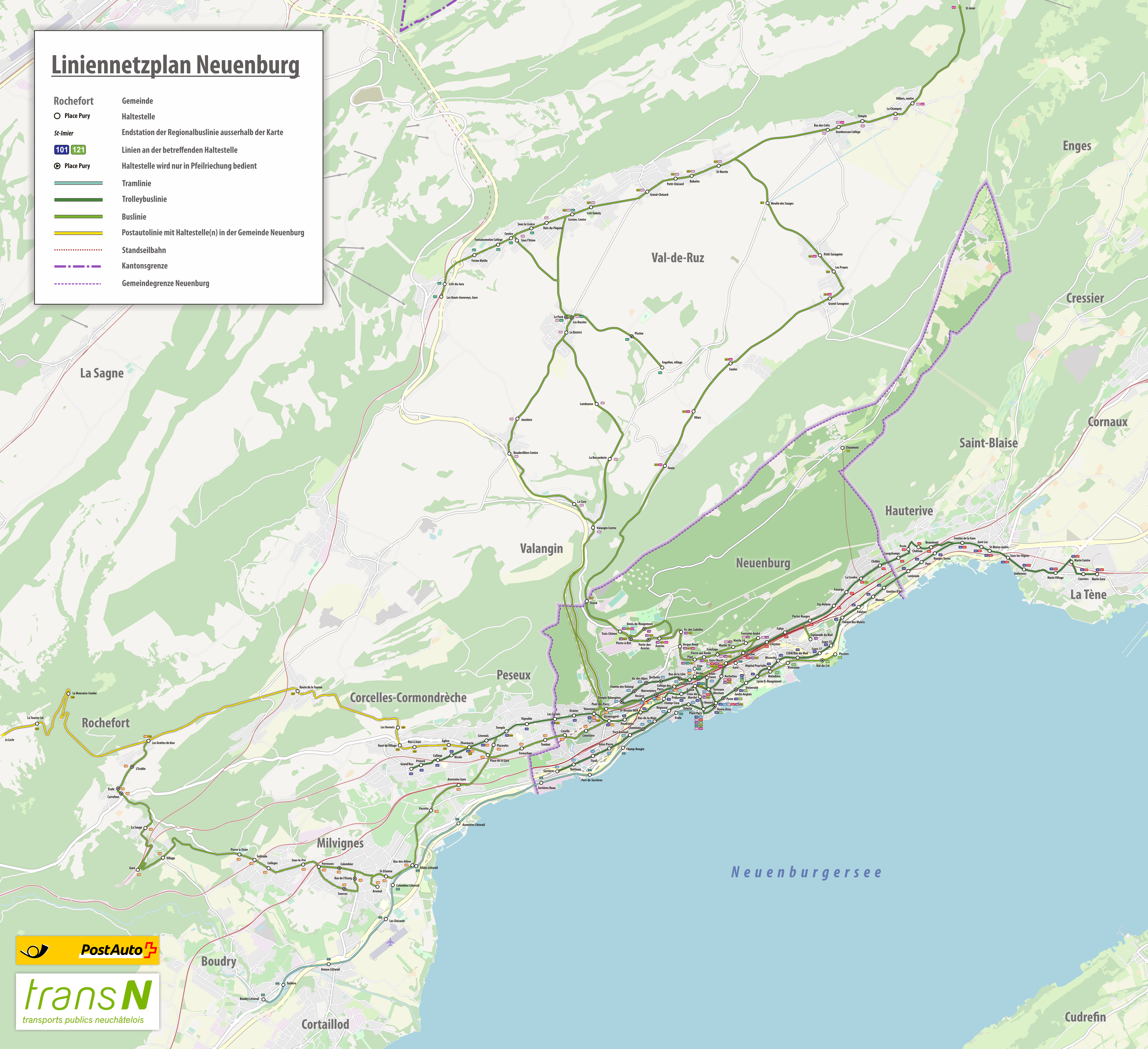 Liniennetzplan der Neuenburger Verkehrs-Betriebe (transN), 2020